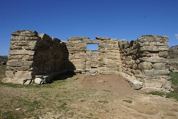 Tempio nuragico di Domu de Orgia, Esterzili